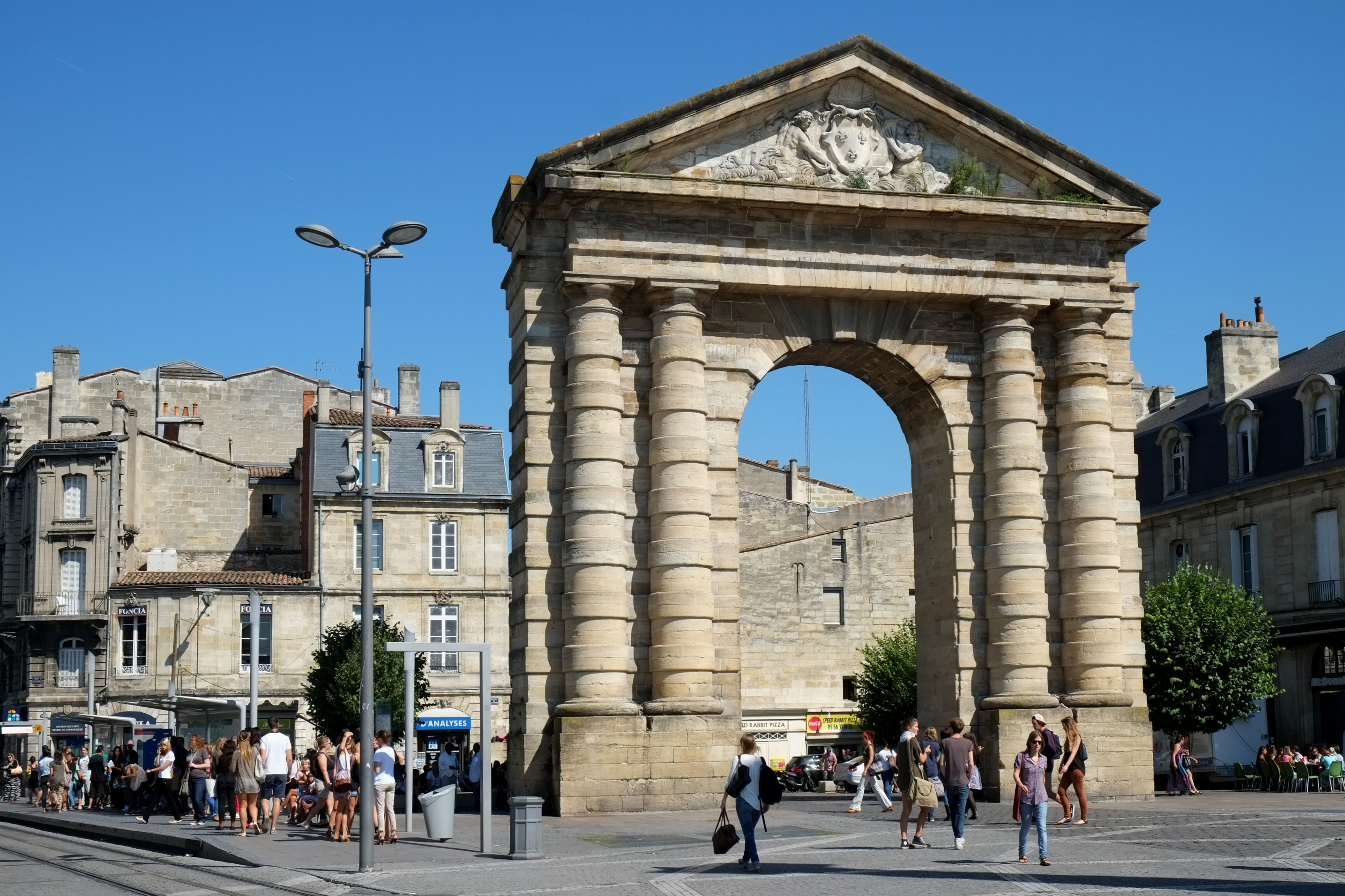 Porte d'Aquitaine Place de la Victoire Bordeaux Gironde France